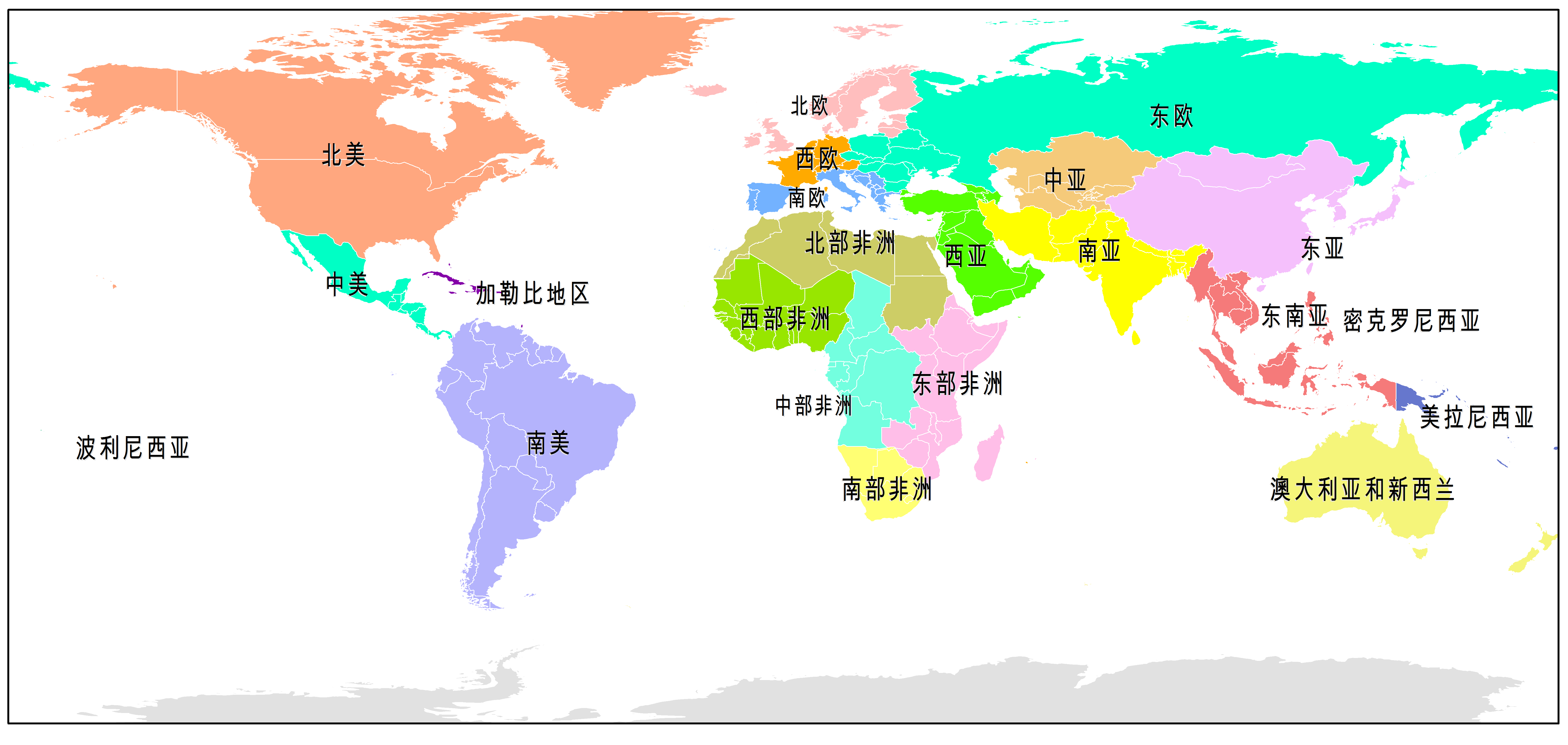 根據聯合國地圖劃分出的地理次區域的世界地圖，地圖邊界檔來源：Template:Link-en。欲再加工原始檔請用此[1]